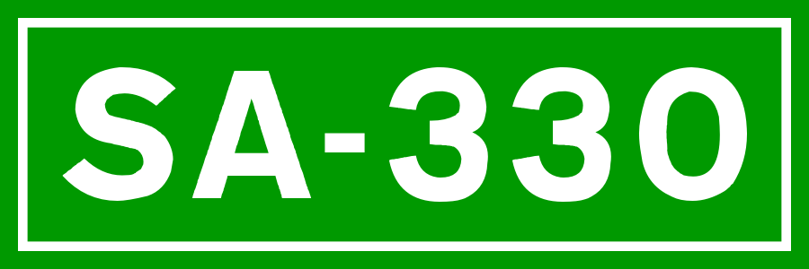 Cartel indicador de la carretera SA-330